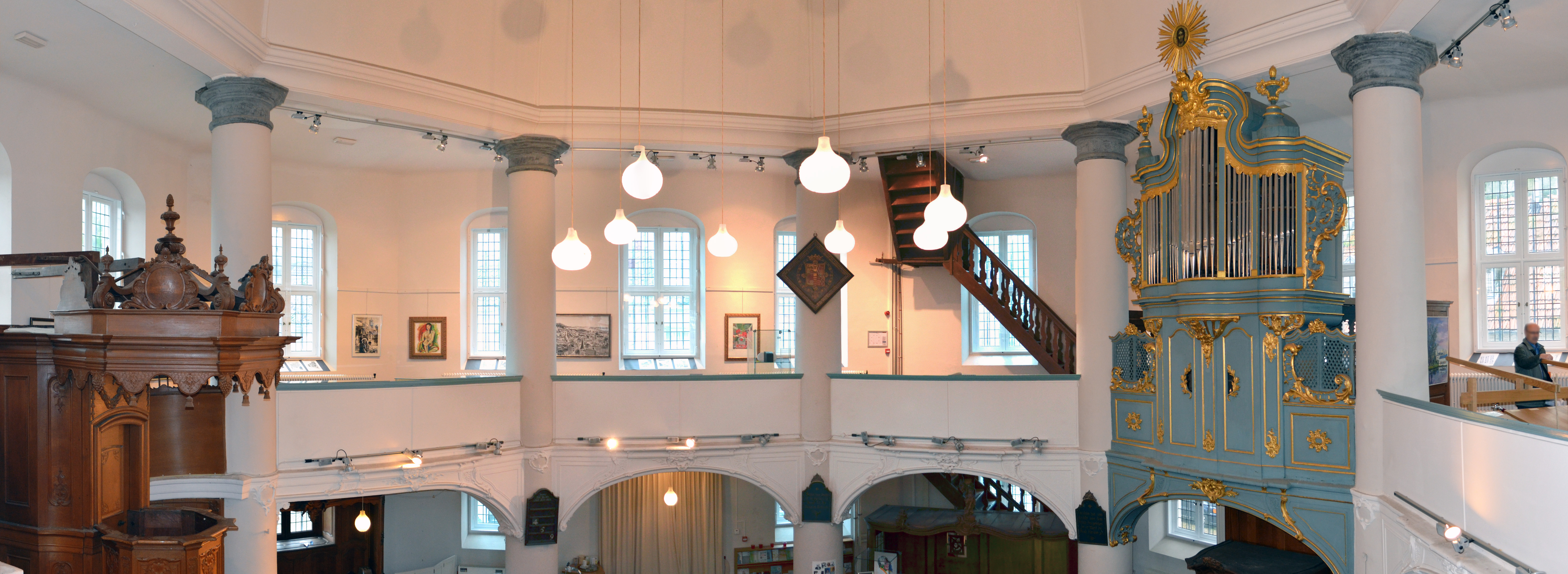 Lutherische Kirche de Kopermolen in Vaals, Innenansicht